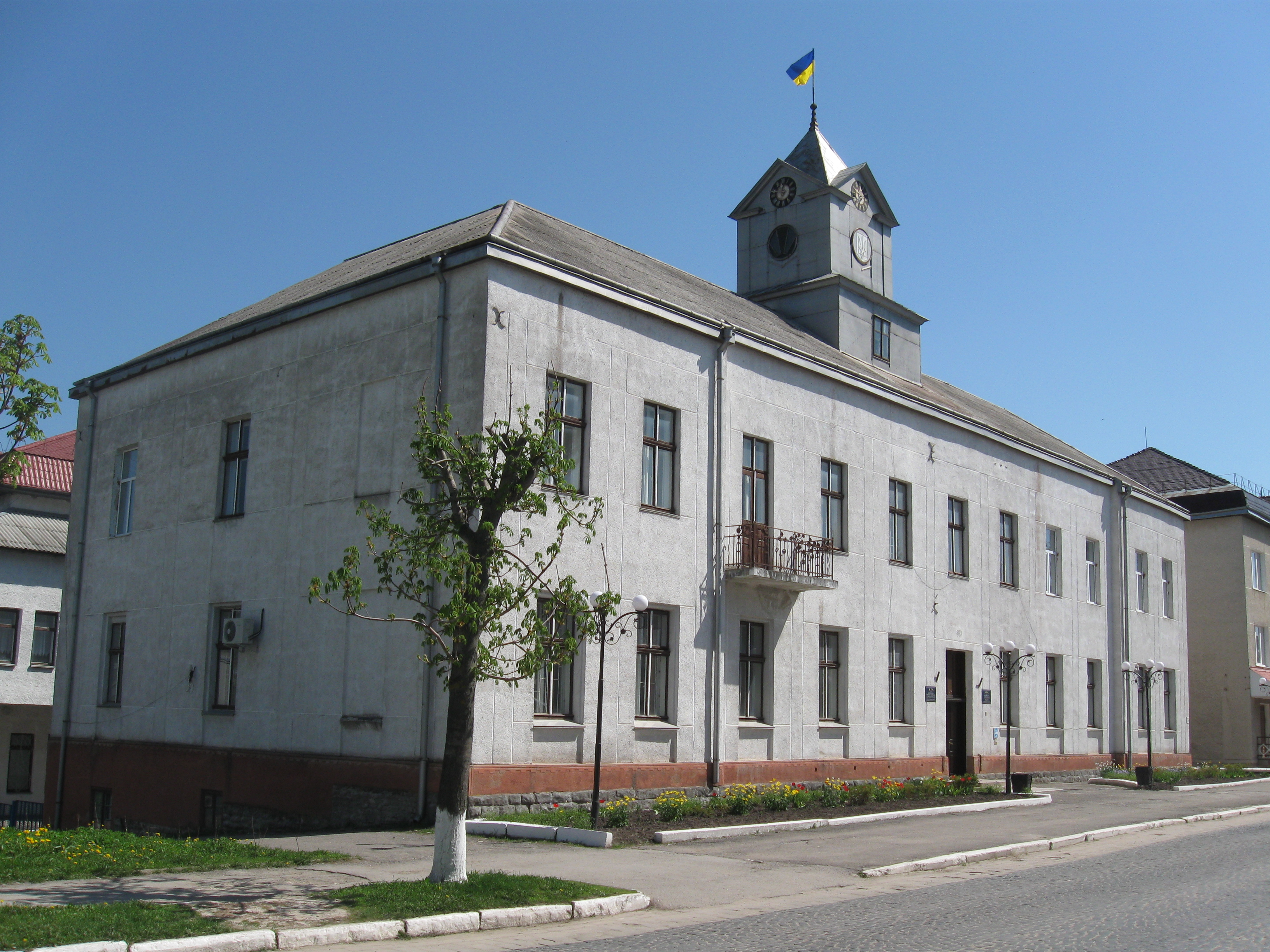 Ратуша у м.Зборів, Тернопільська обл.